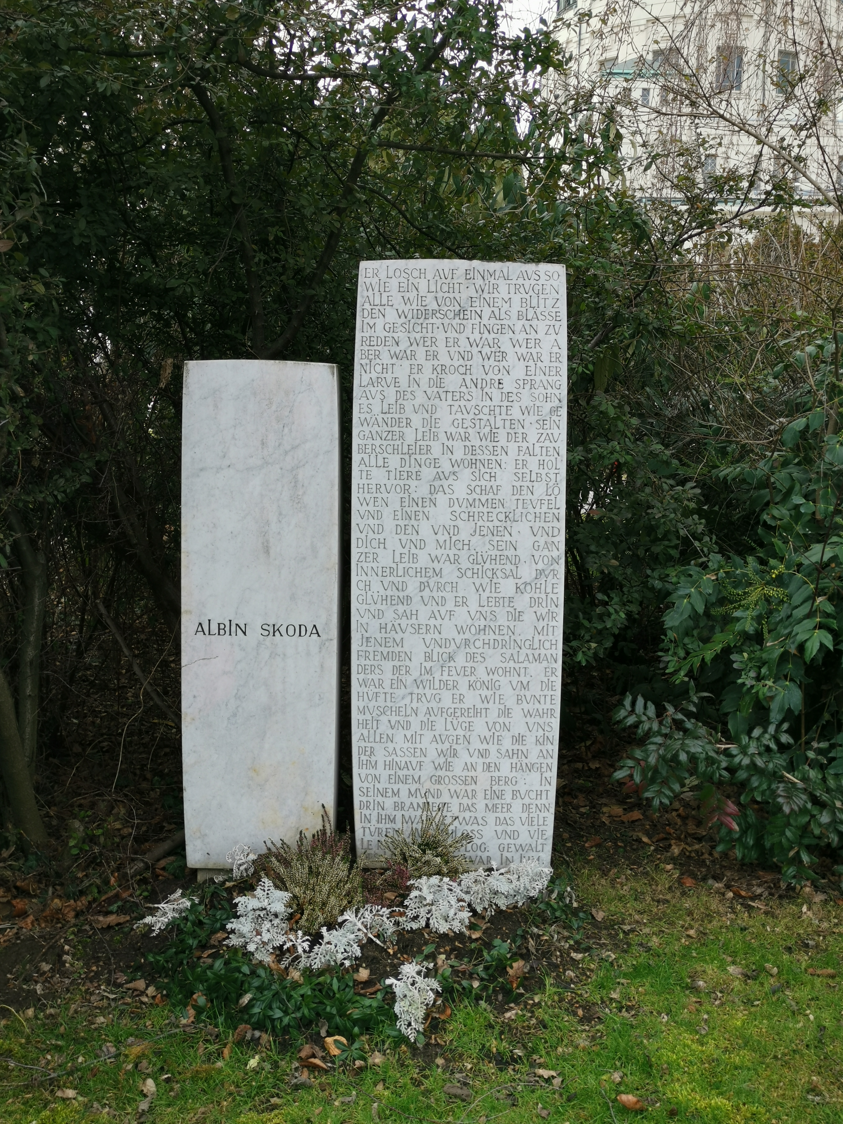 Grab von Albin Skoda auf dem Wiener Zentralfriedhof